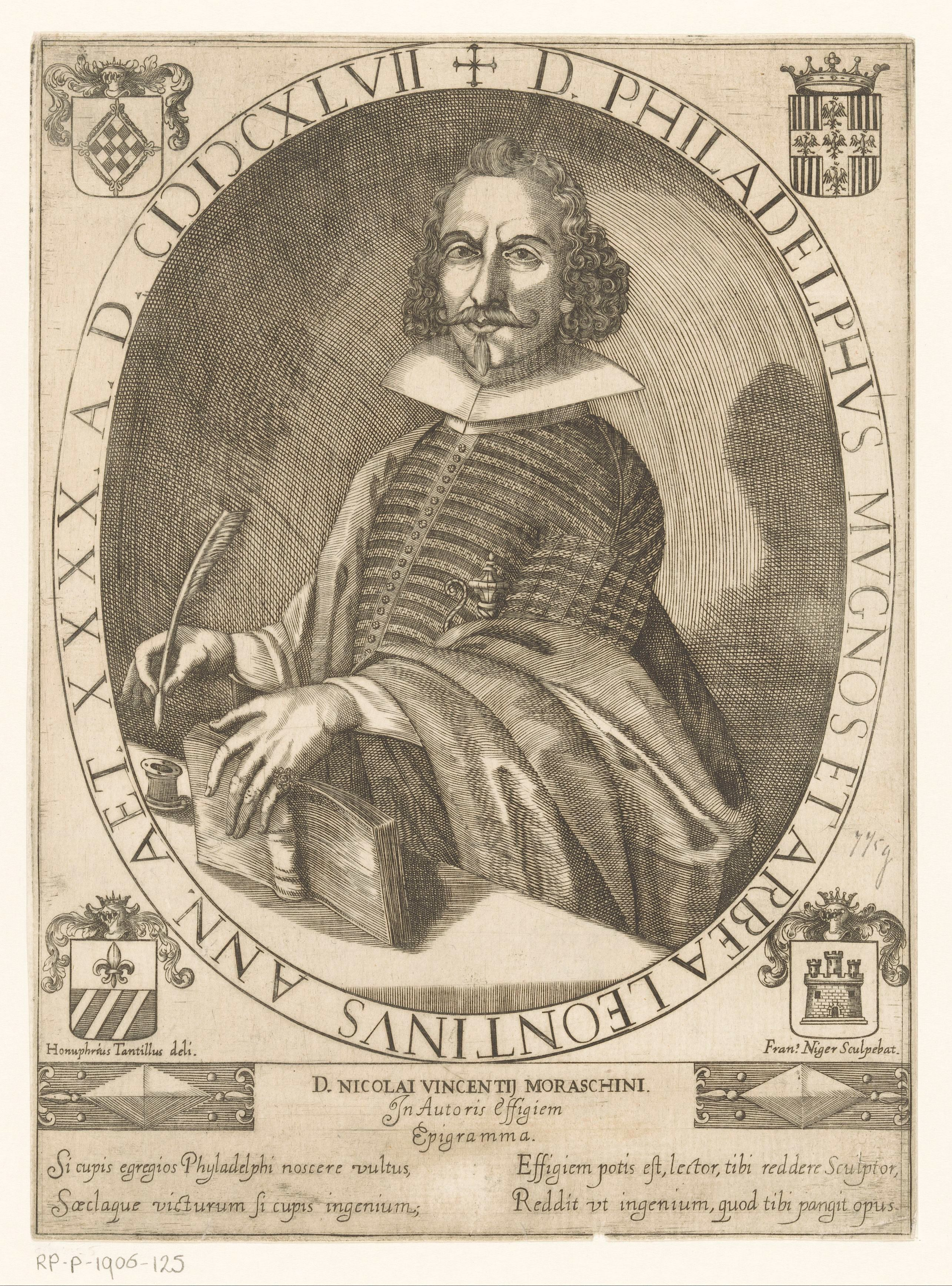 IdentificatieTitel(s): Portret van historicus Filadelfo Mugnos op 40-jarige leeftijdD. Philadelphus Mugnos et Arbea Leontinus (titel op object)Objecttype: prent Objectnummer: RP-P-1906-125Catalogusreferentie: Aantal staten bekend-1(2)Opmerking: Eerste staat voor Latijnse tekst op de tafel.Opschriften / Merken: verzamelaarsmerk, verso, gestempeld: Lugt 2228verzamelaarsmerk, verso, gestempeld: Lugt 1388Omschrijving: In de hoeken vier wapenschilden. In de ondermarge een Latijnse tekst in twee kolommen.VervaardigingVervaardiger: prentmaker: Francesco Negri (vermeld op object)naar tekening van: Honuphrius Tantillus (vermeld op object)opgedragen aan: Nicolai Vincentius Moraschini (vermeld op object)Plaats vervaardiging: ItaliëDatering: in of na 1647Fysieke kenmerken: ets en gravureMateriaal: papier Techniek: graveren (drukprocedé) / etsenAfmetingen: blad: h 259 mm (Binnen plaatrand afgesneden.) × b 191 mm (Binnen plaatrand afgesneden.)ToelichtingPrent gebruikt voor de publicatie: Mugnos, Filadelfo. Historia della Casa Colonna. Venetië: 1658.OnderwerpWat: writer, poet, authorportrait of a writerhistorical personsarmorial bearing, heraldryWie: Filadelfo MugnosVerwerving en rechtenVerwerving: aankoop 1906Copyright: Publiek domein